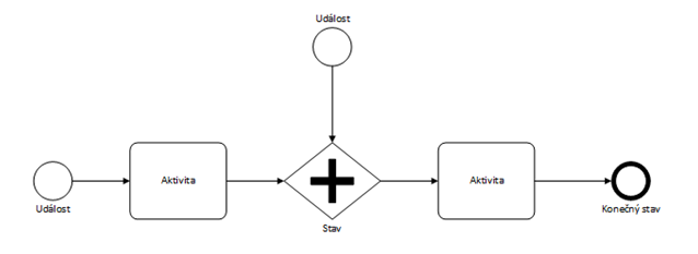 Vzor pro procesní diagram dle metodikou MMABP.